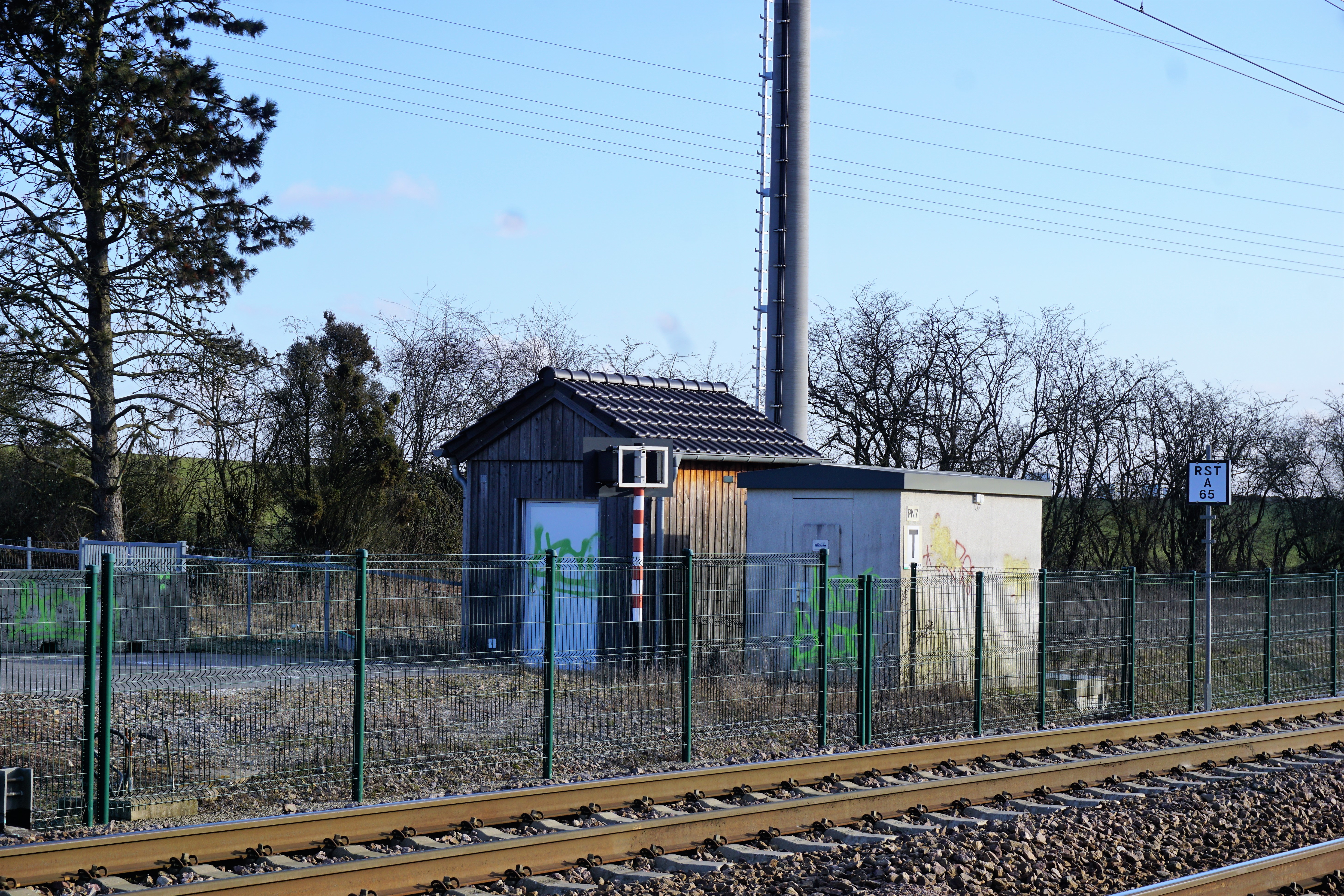 Leudelange, Schléiwenhaff. Passage à niveau (PN7) désaffecté. Antenne et équipement à l'endroit de l'anciennemaisons de garde-barrière.